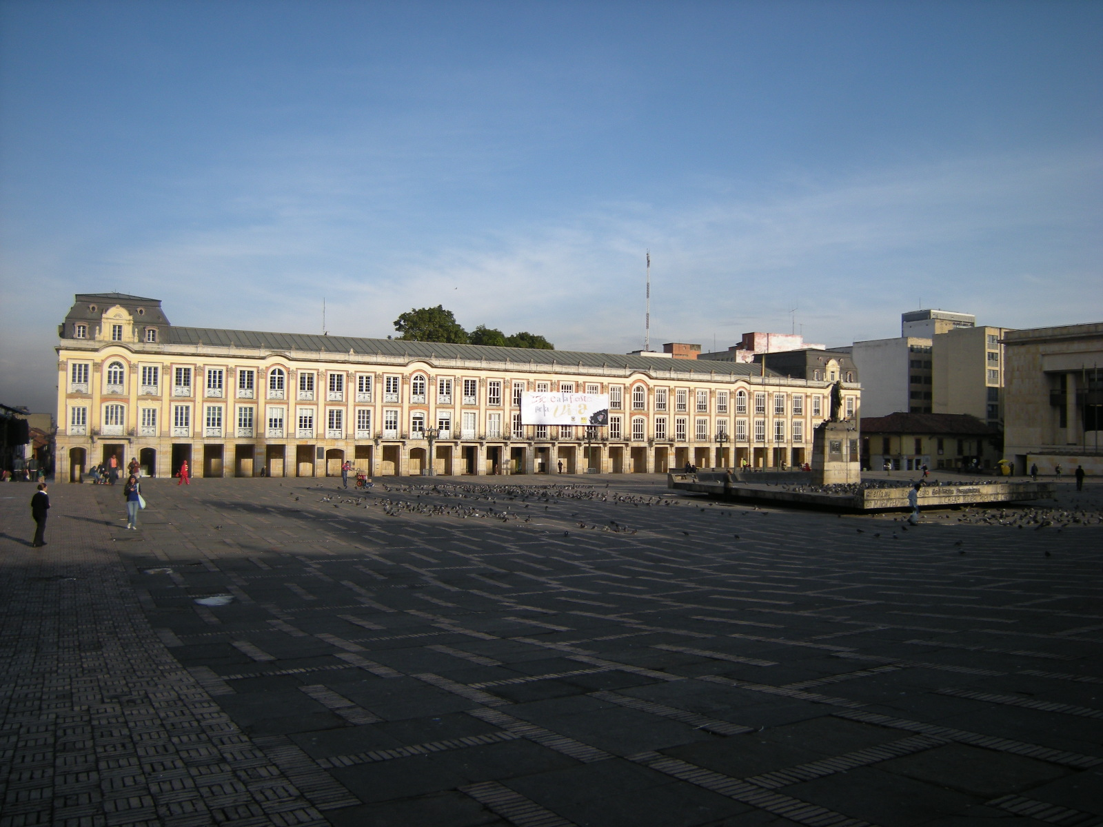 Prefeitura de Bogotá, Plaza de Bolívar